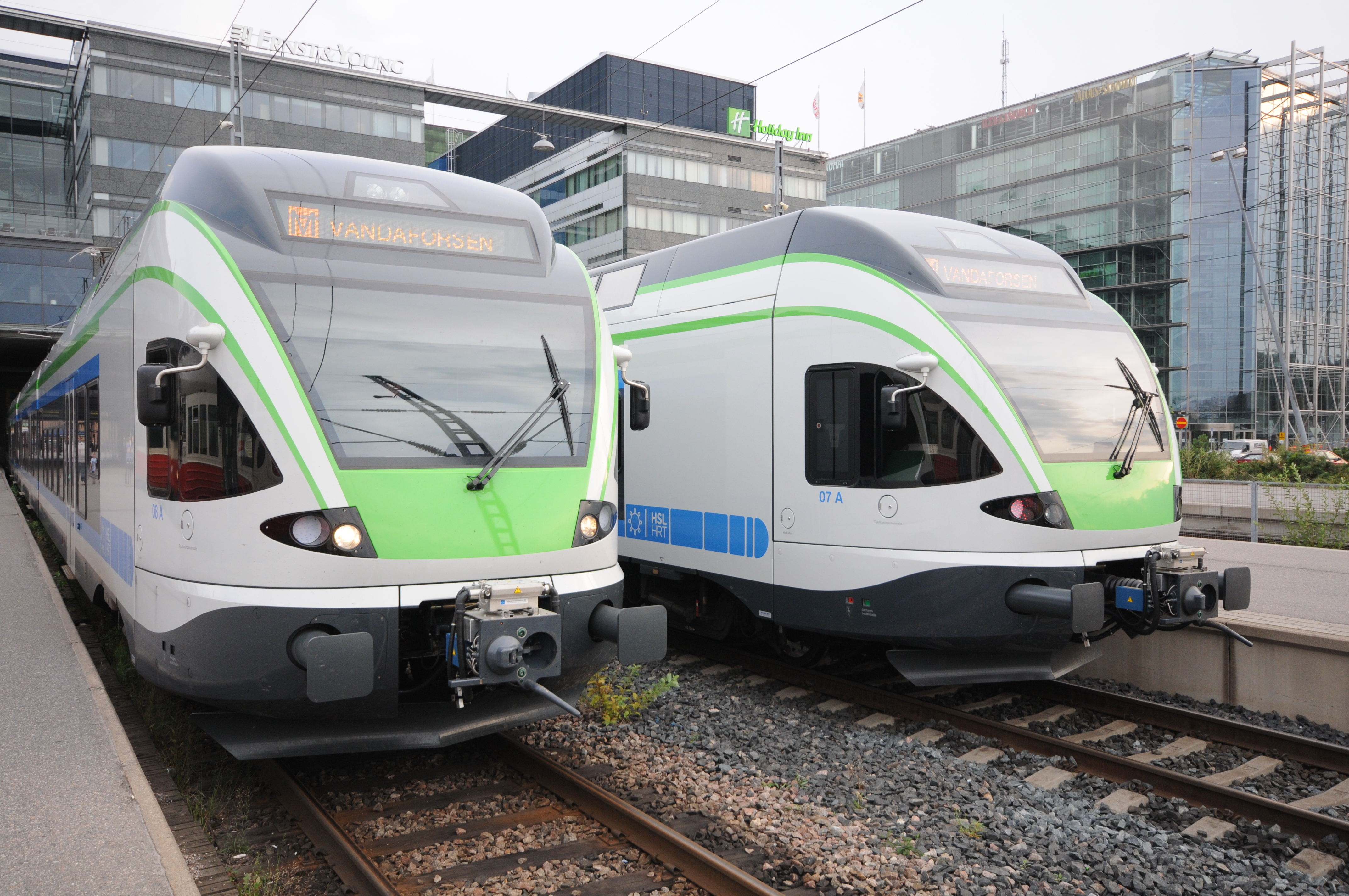 Helsinki Hauptbahnhof; JKOY Class Sm5